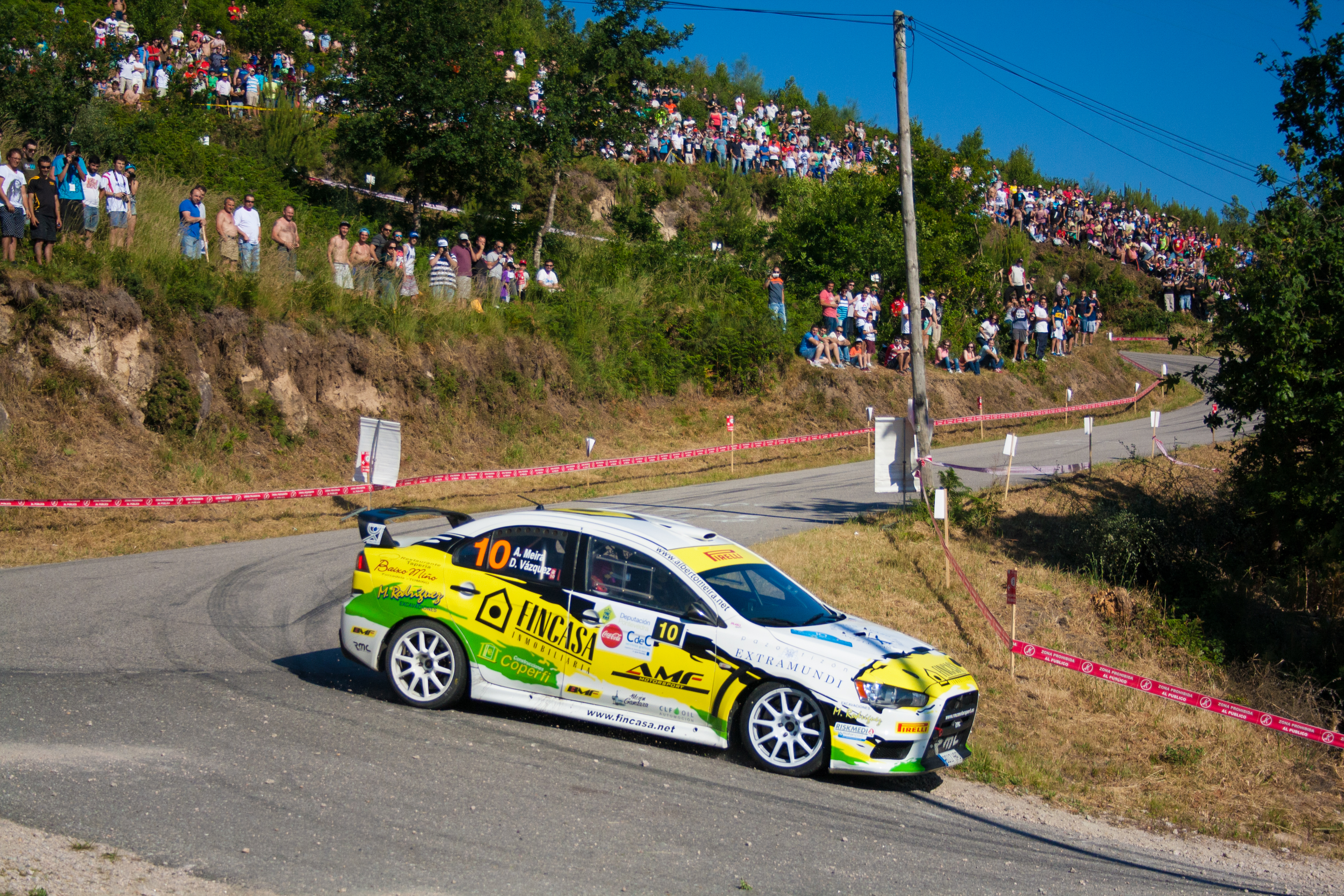 TC 2-4 (Nigrán)